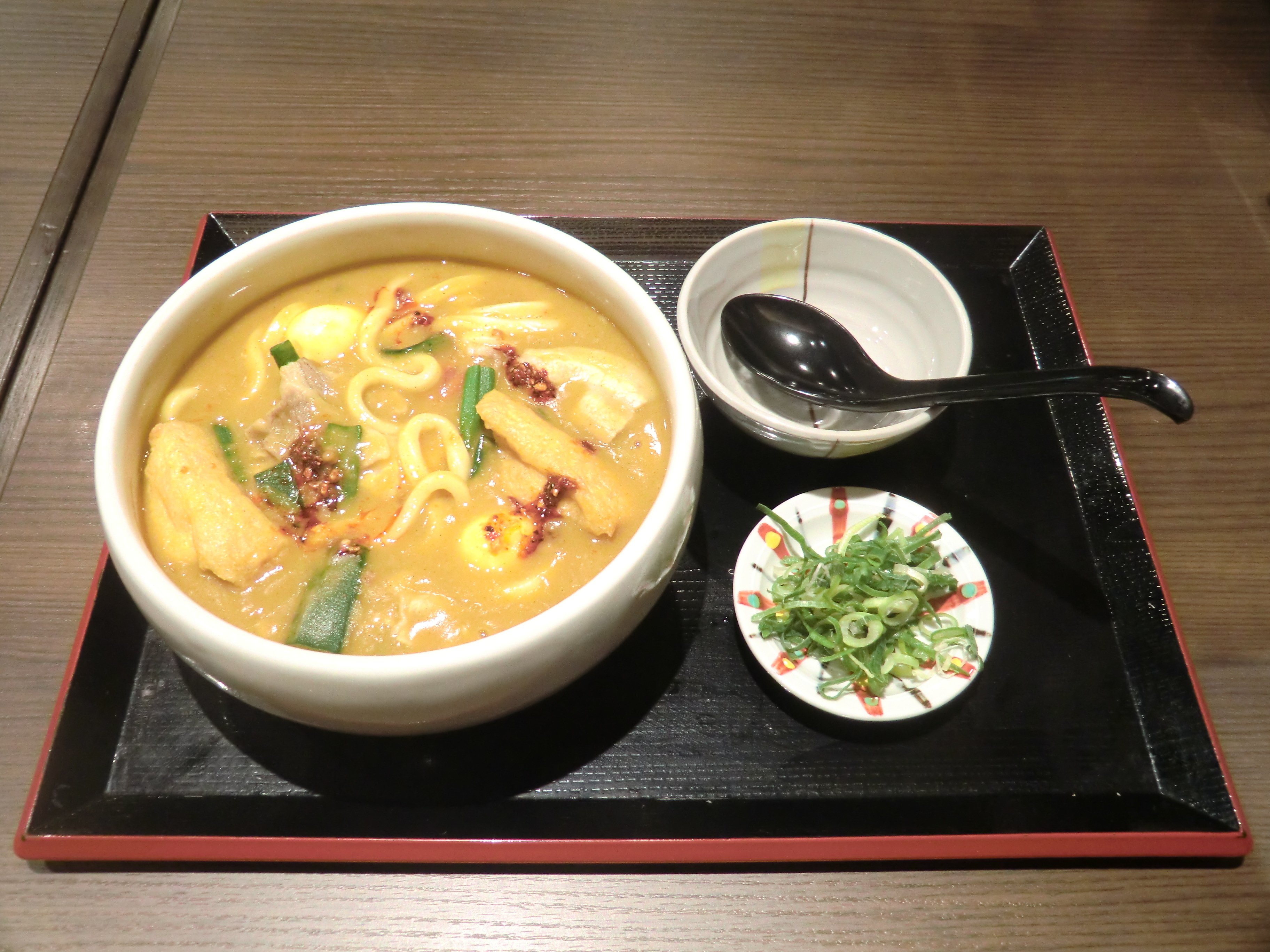 豊橋カレーうどん。みかわの郷カルミア店にて